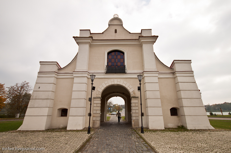 Нясвіж. Слуцкая брама